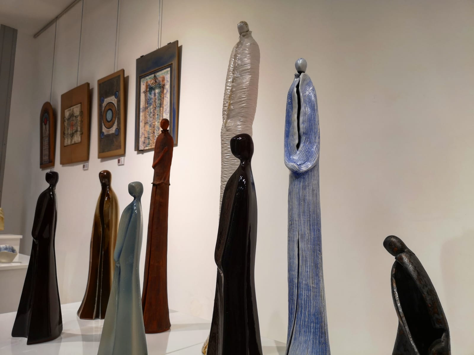 Hacettepe Üniversitesi'nin Beytepe Kampüsü'nde bulunan Hamiye Çolakoğlu Seramik Müzesi'nden bir görüntü.